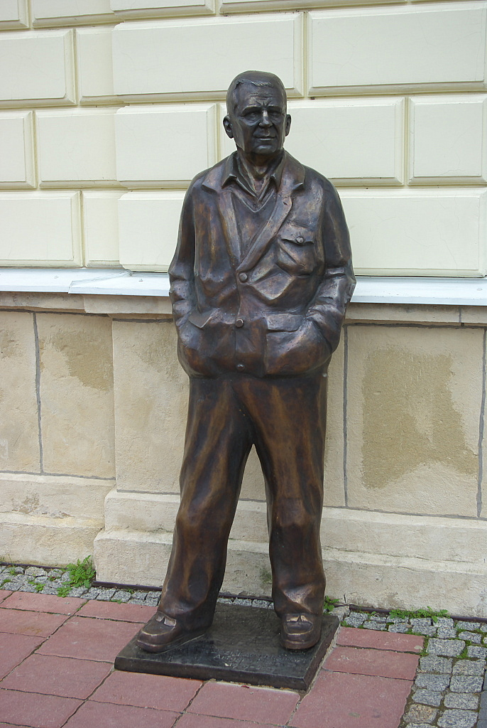 Pomnik Zdzisława Beksińskiego w Sanoku